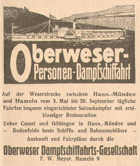 Werbeinserat zur Firma Oberweser-Personen-Dampfschiffahrts-Gesellschaft F.W. Meyer in Hameln.